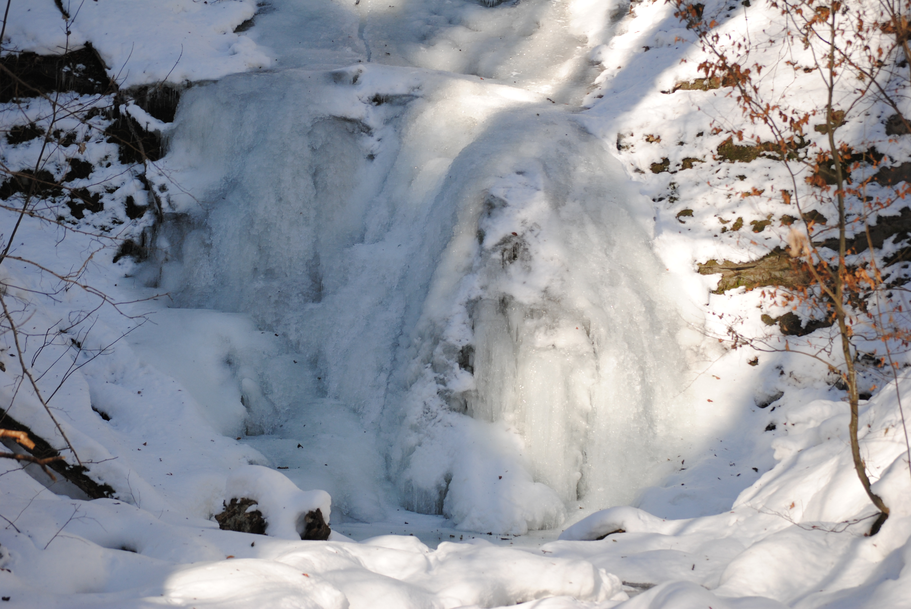 Gelistetes Geotop in der Gemeinde Großweil im Landkreis Garmisch-Partenkirchen, Bayern